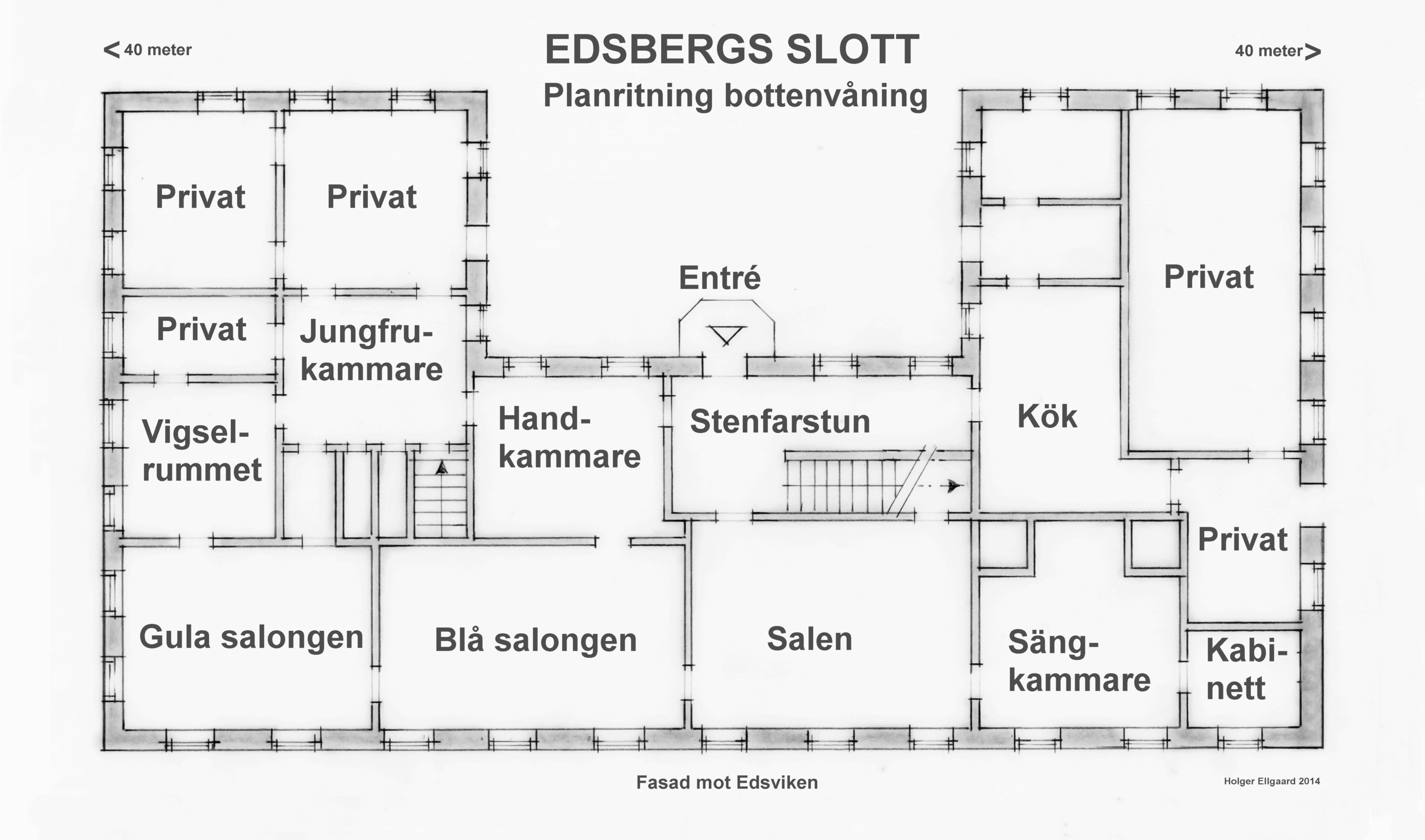 Edsbergs slott planritning, upphovsman Carl Wijnbladh, 1760-tal, källa Sollentuna kommun